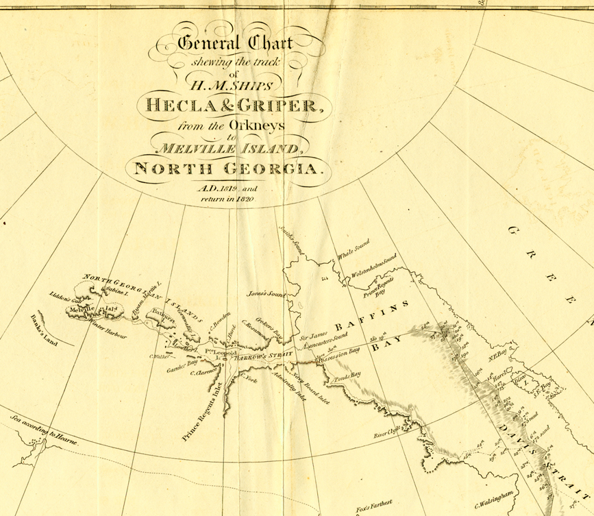 Grabado de la obra Journal of a Voyage for the Discovery of a North-West Passage from the Atlantic to the Pacific: Performed in the Years 1819-20, in His Majesty's Ships Hecla and Griper... publicada en Londres en 1821. [Rare Books Division]